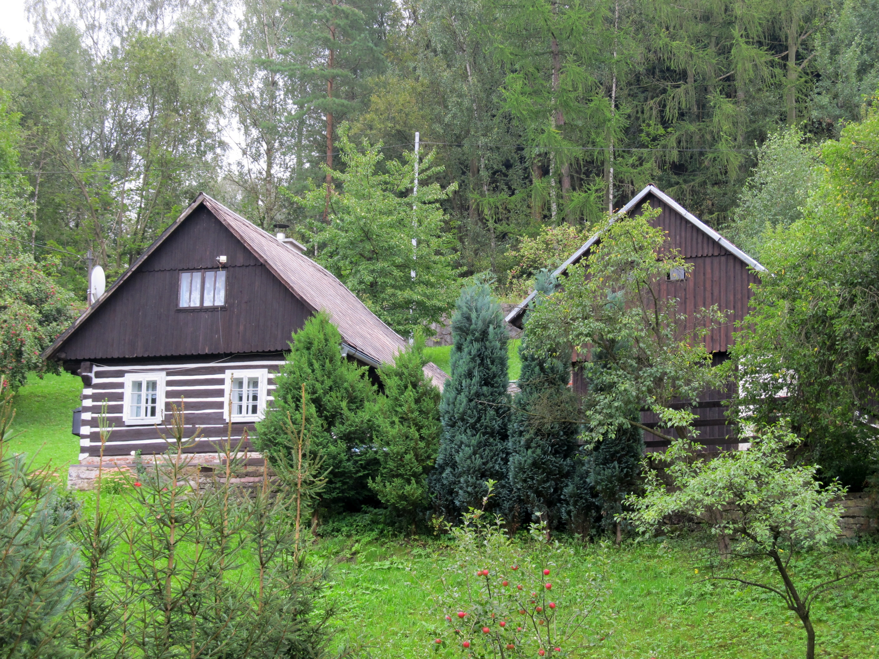 Venkovský dům (Strážkovice), Strážkovice 51